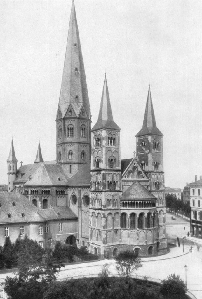 Bonner Münster